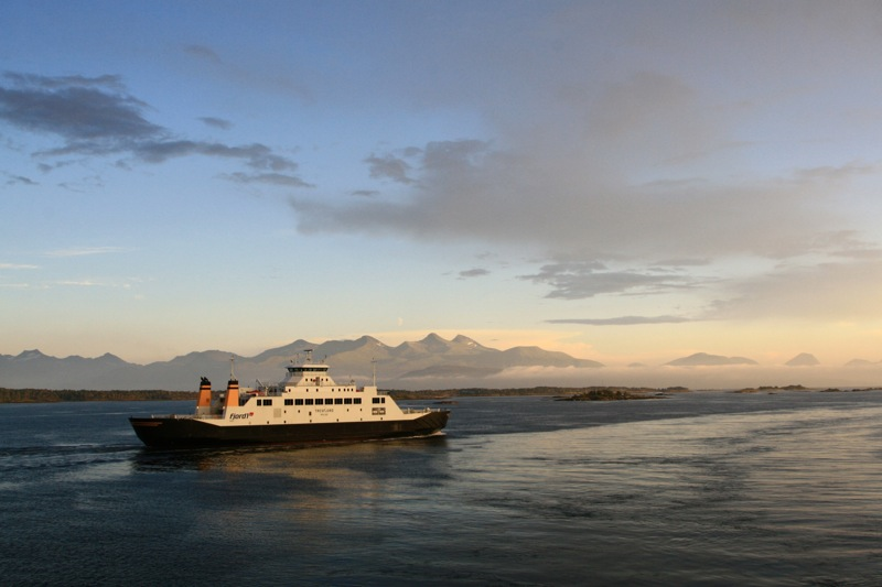 Fjord1 MRF si ferje MF Tresfjord utanfor Molde